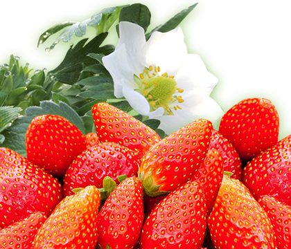 fraises + fleur fraisier montage détourage d'après